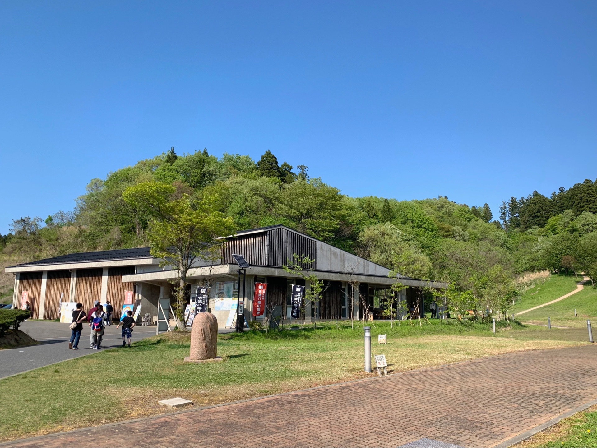 弥生の丘展示館の外観。右奥は古津八幡山遺跡への散策路。（2019年5月、新潟市秋葉区）